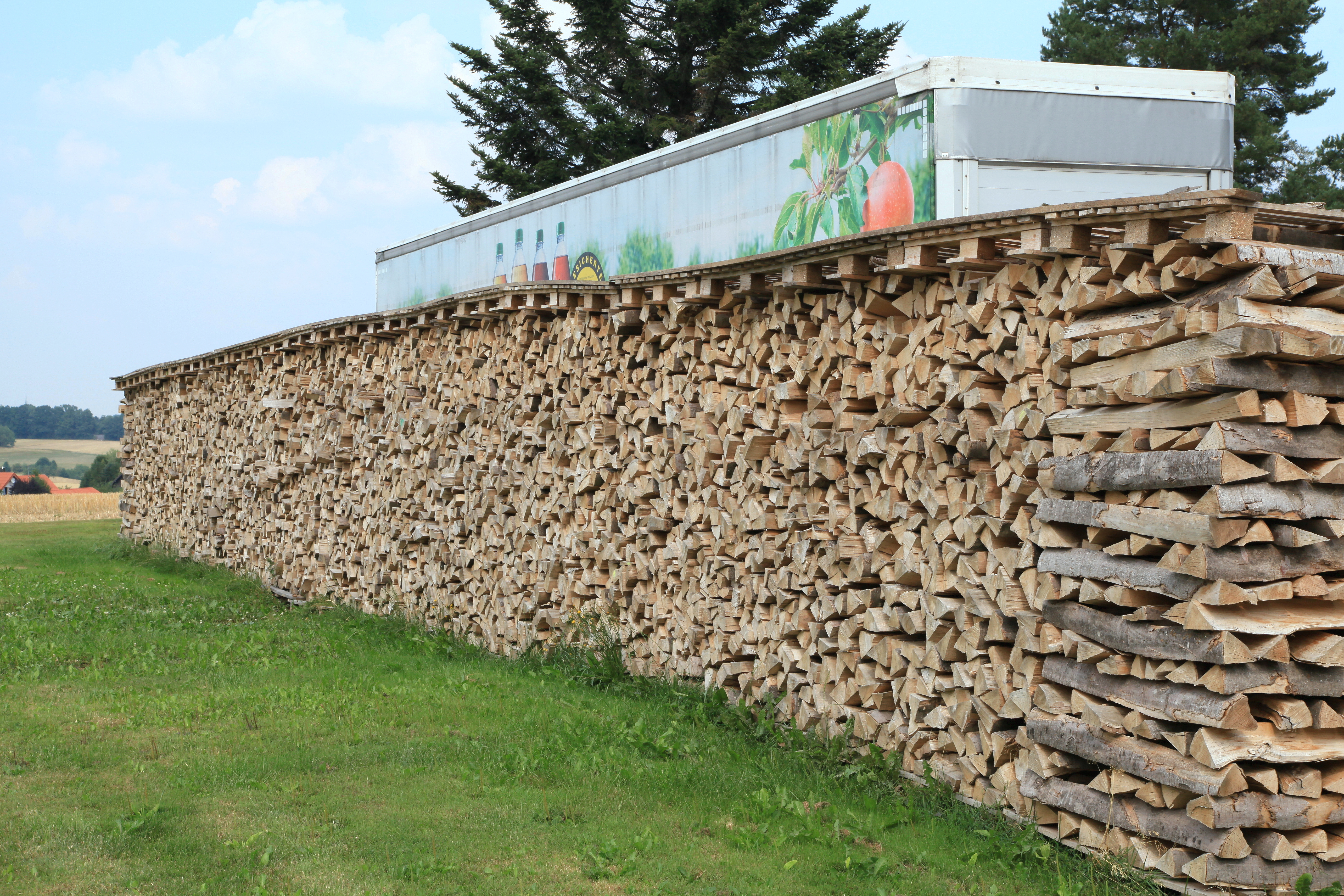 Alte Badstraße in Siehdichfür, Oberreichenbach (Schwarzwald)